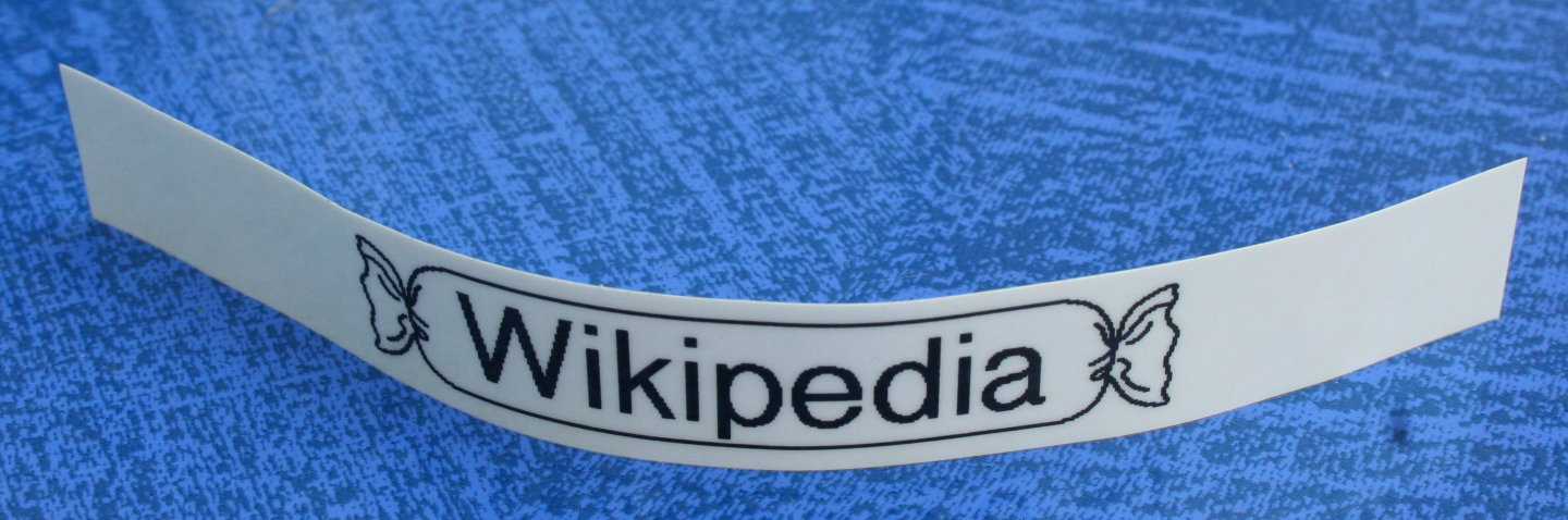 Beschriftungsband